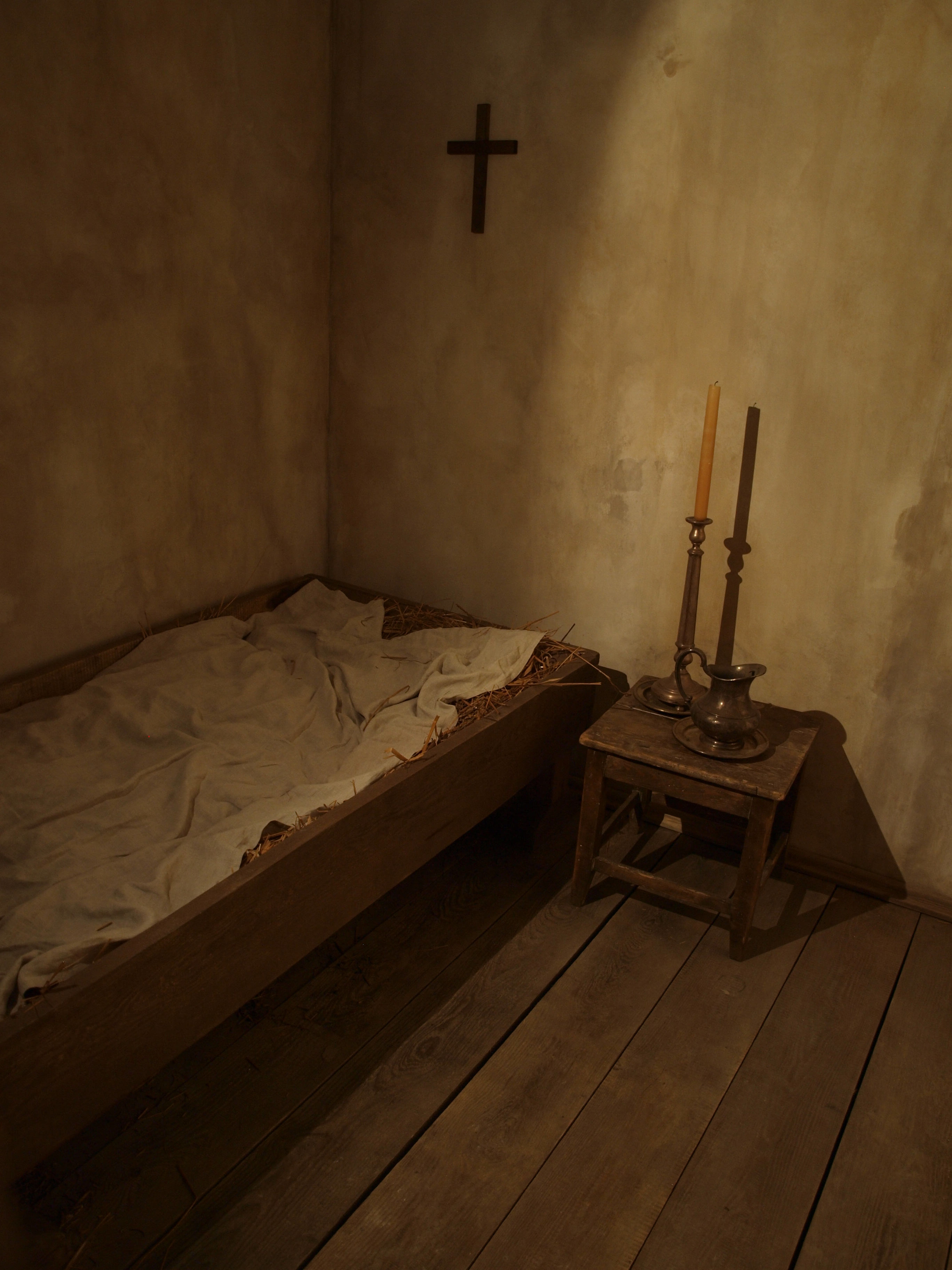 Ekspozycja "Cela Konrada" w Wilnie